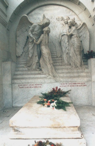 Radebeul: Grab von Karl May / Karl May's Grave